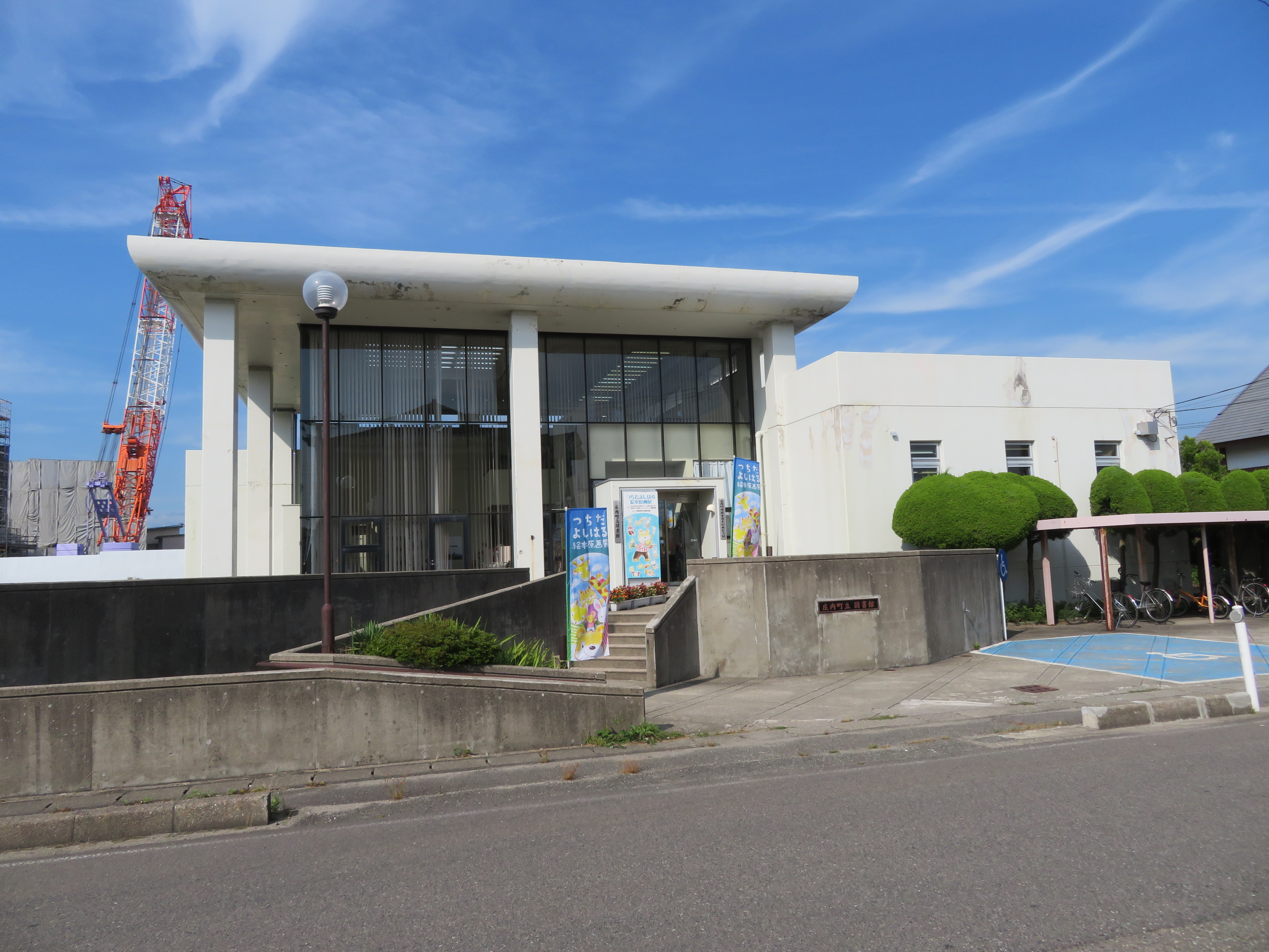 山形県に所在する庄内町立図書館